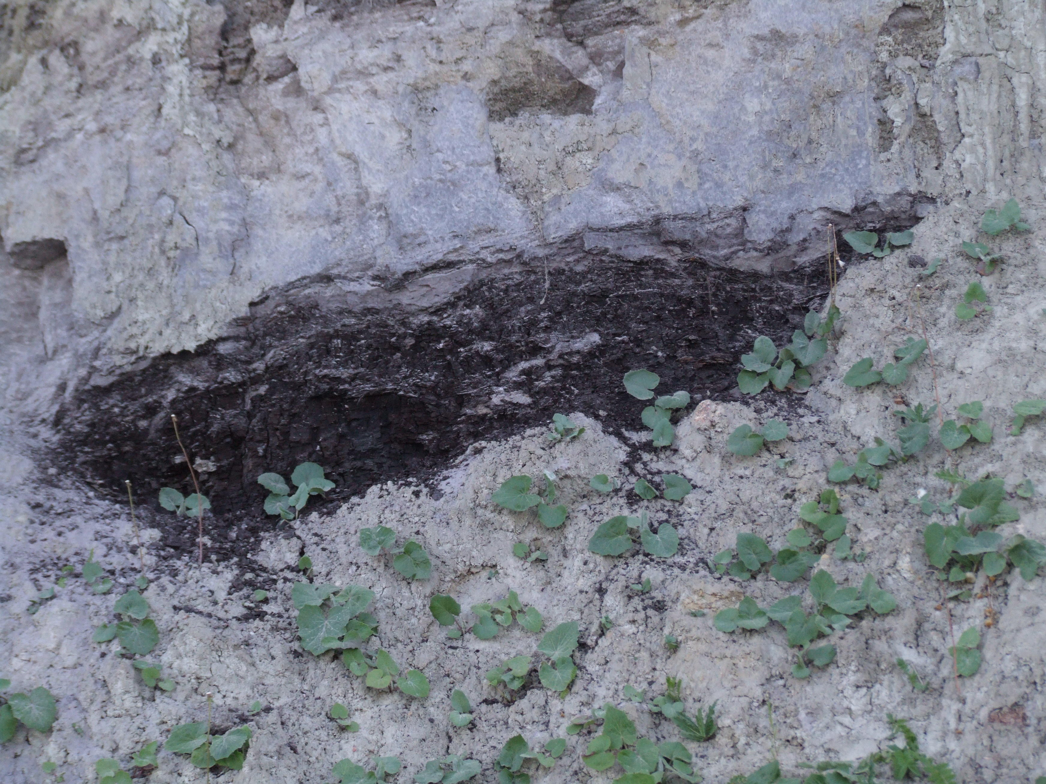 Klif w Gdyni-Orłowie.